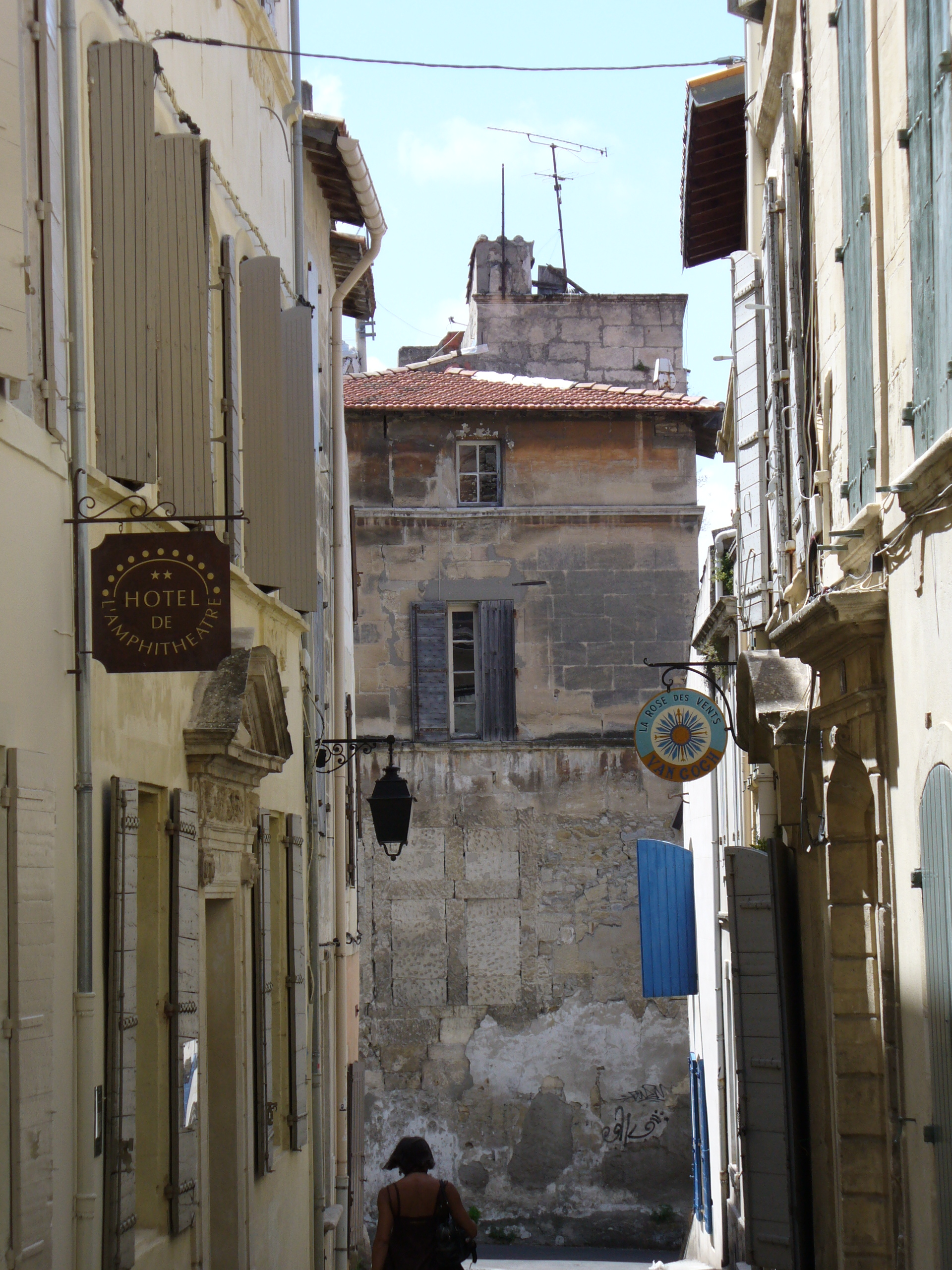 Arles-Provence